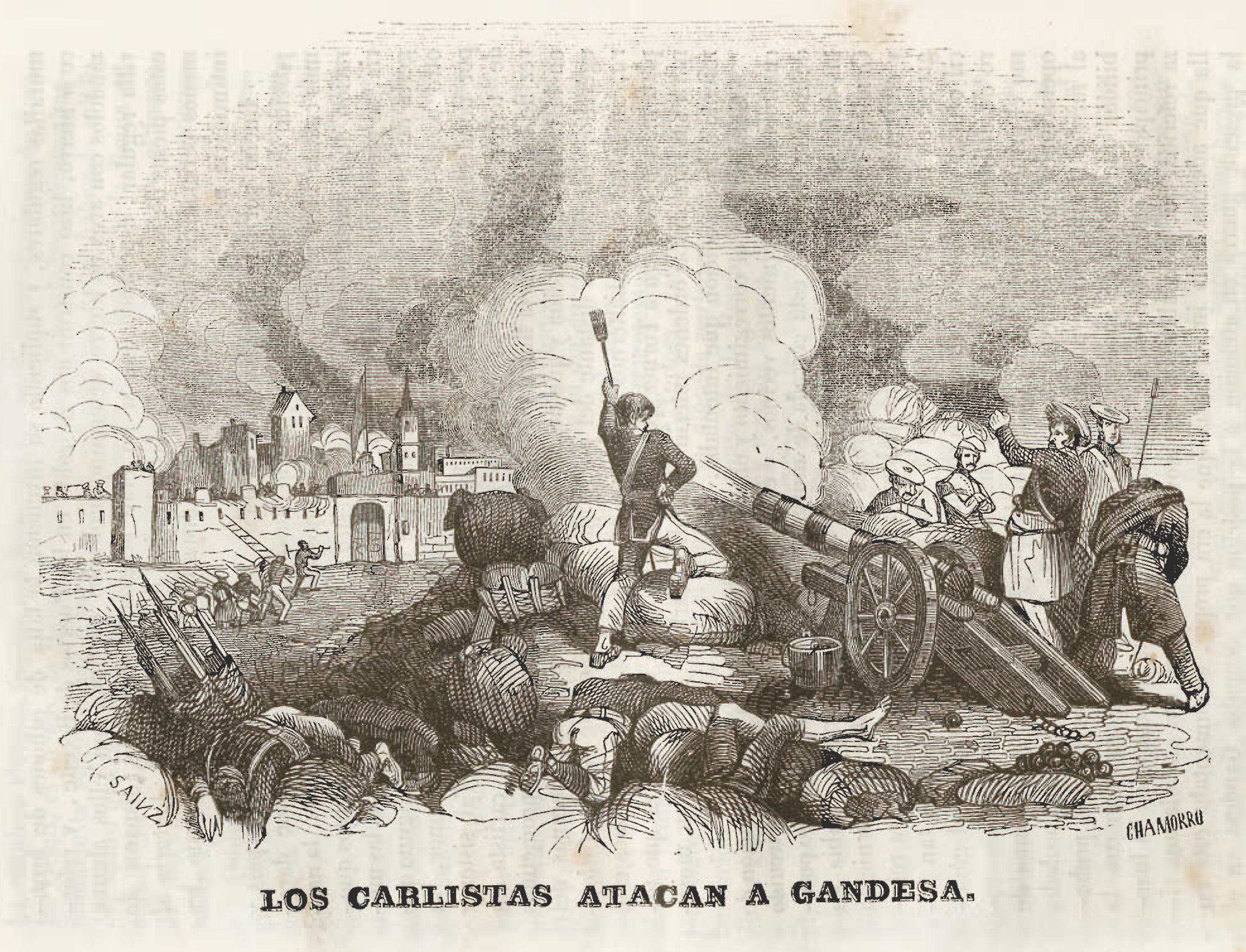 Los carlistas atacan a Gandesa.